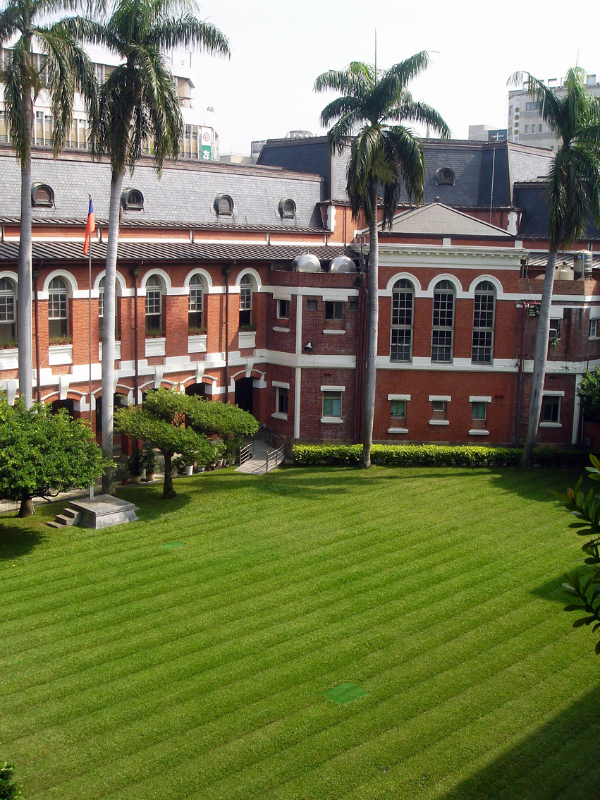 中文（台灣）: 台中州廳中庭